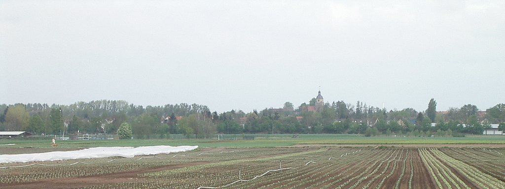 Großgründlach, Stadtteil von Nürnberg, Ortsansicht von Süden. In der Mitte die Kirche. Im Vordergrund ein Gemüsefeld (siehe Knoblauchsland), im linken Mittelgrund ein ausgebreites Fleece zur Beschleunigung des Reifeprozesses.